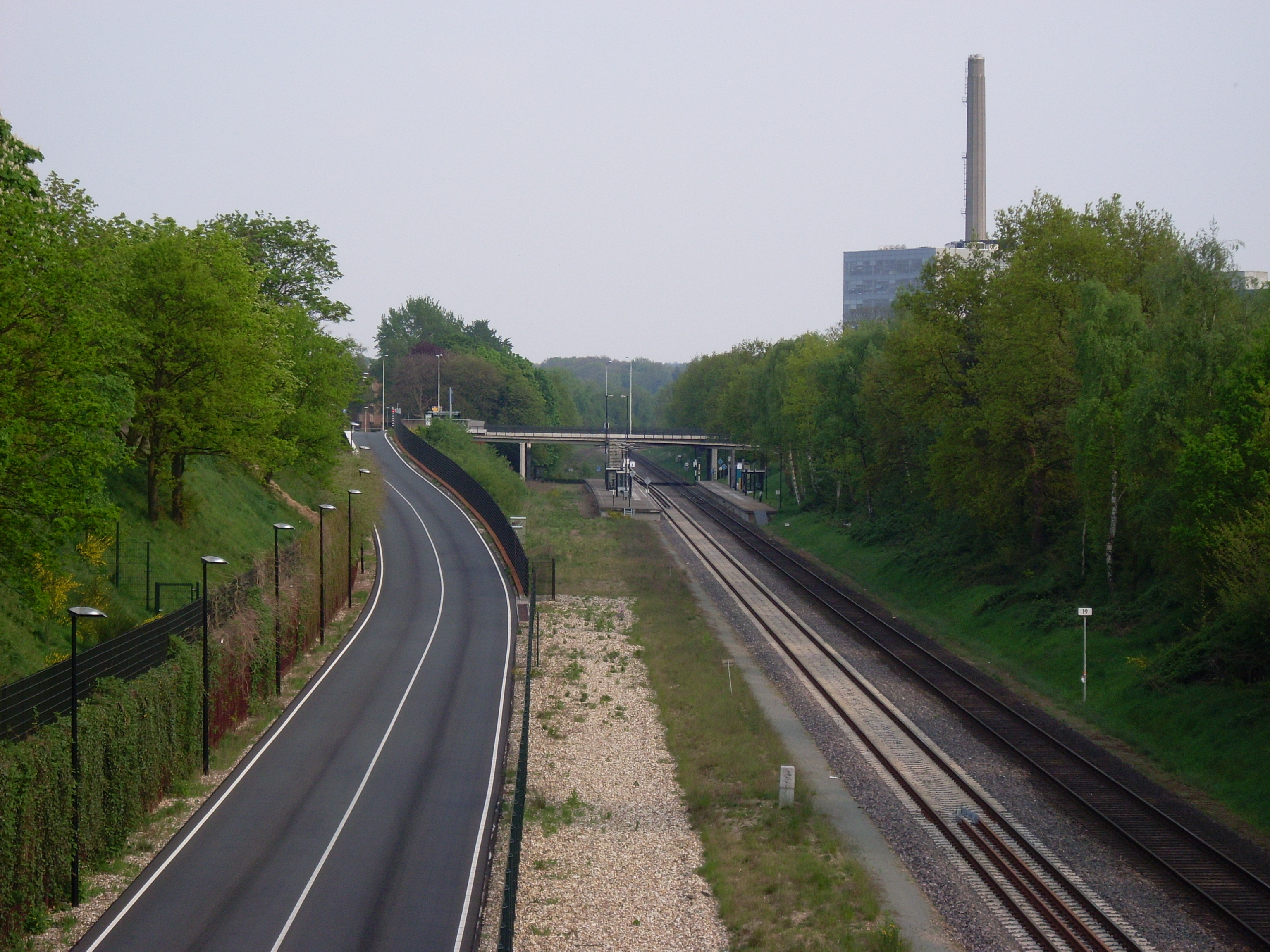 Railway station Nijmegen Heyendaal